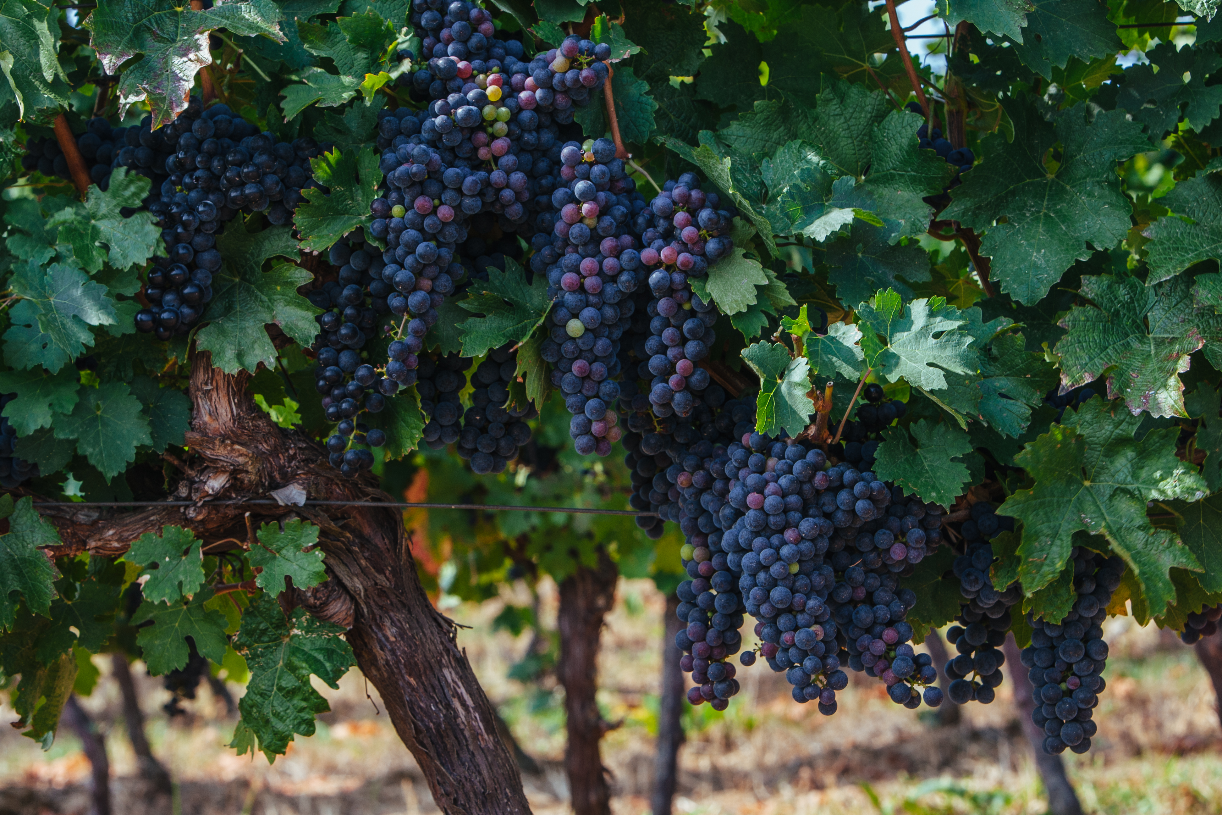 Майбутній урожай винограду на плантаціях Малої Гори поблизу Берегова